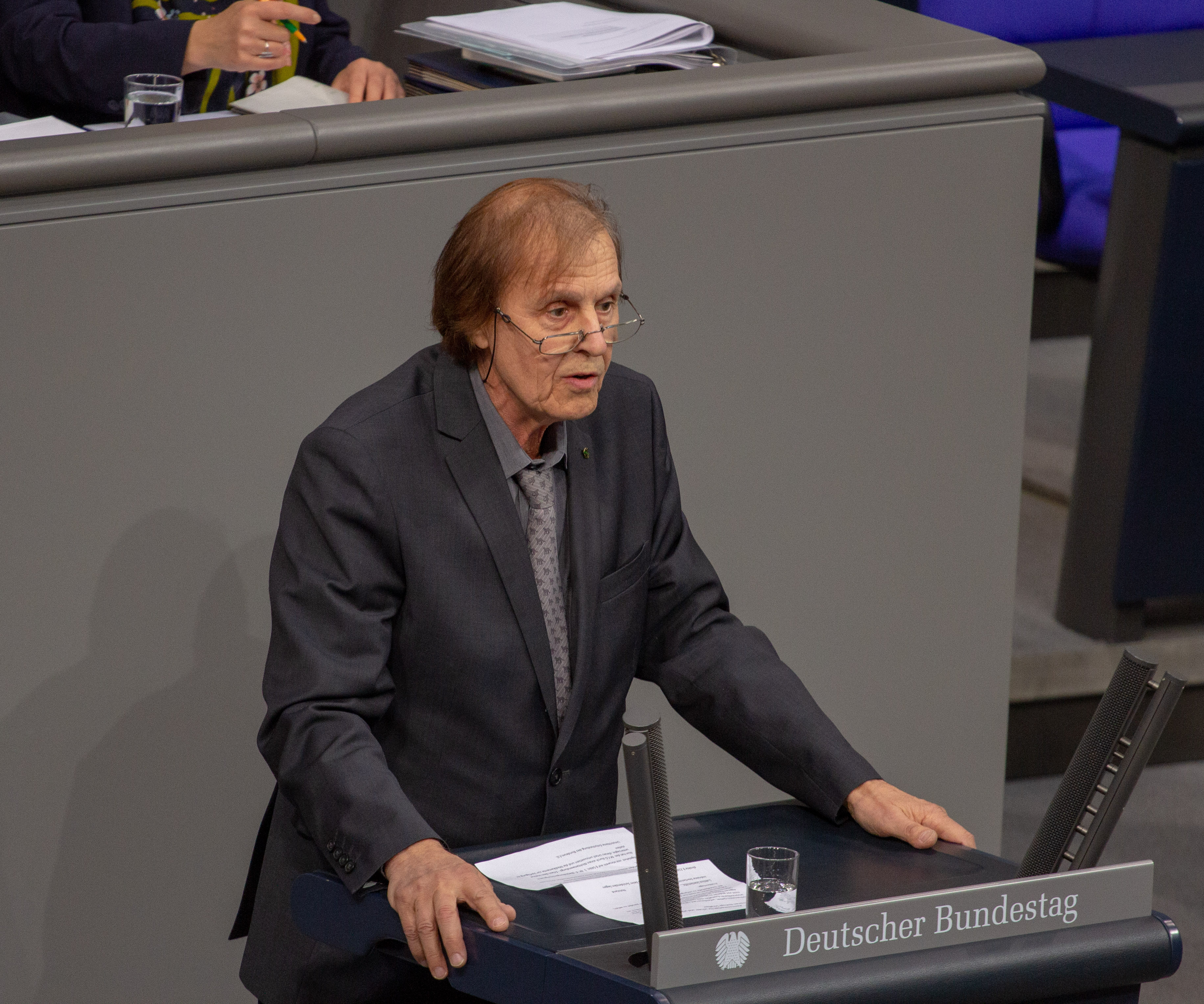 Detlev Spangenberg, Mitglied des Deutschen Bundestages, während einer Plenarsitzung am 11. April 2019 in Berlin.